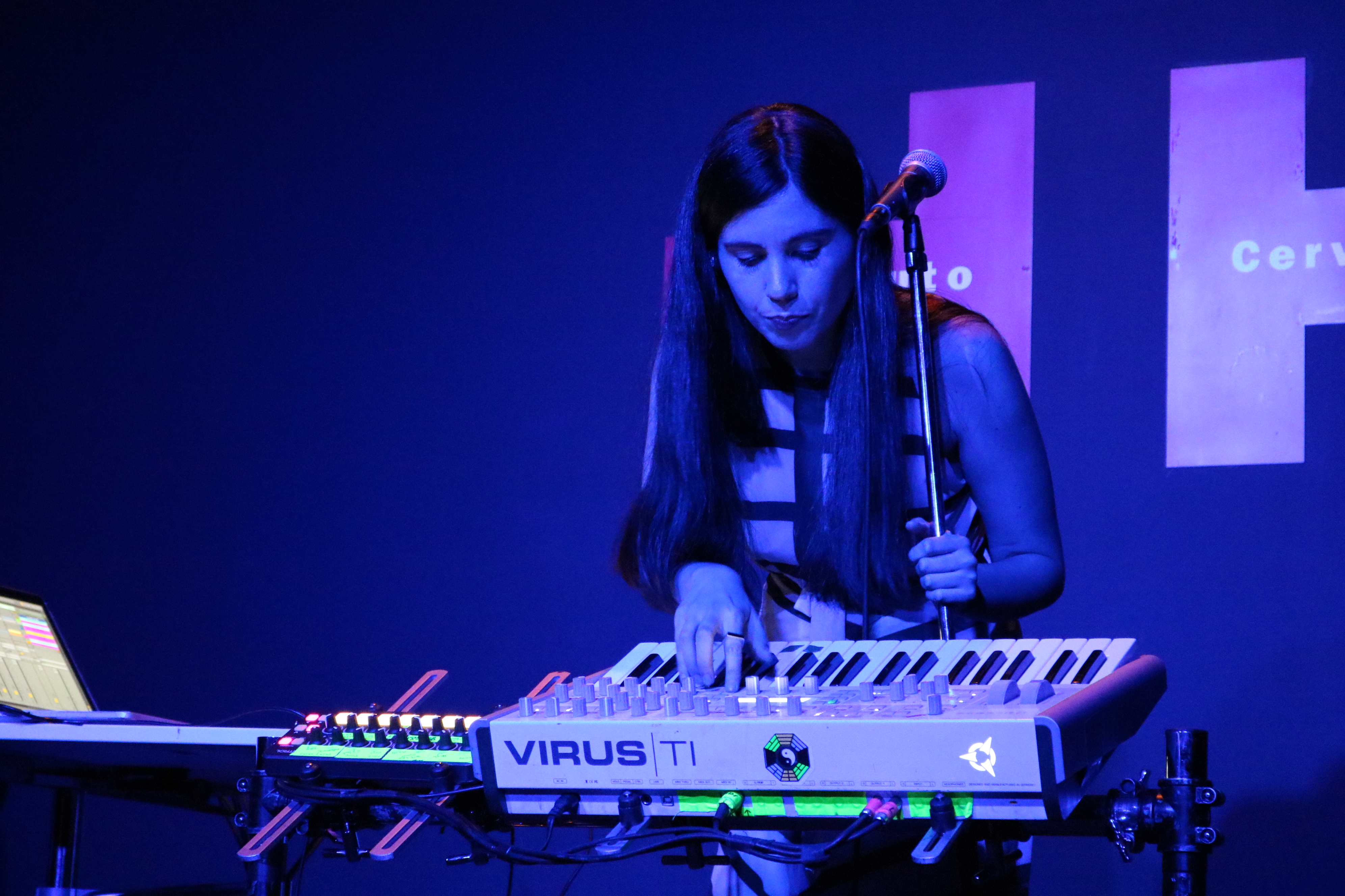 Concierto de Javiera Mena 「ハビエラ・メナ」コンサート